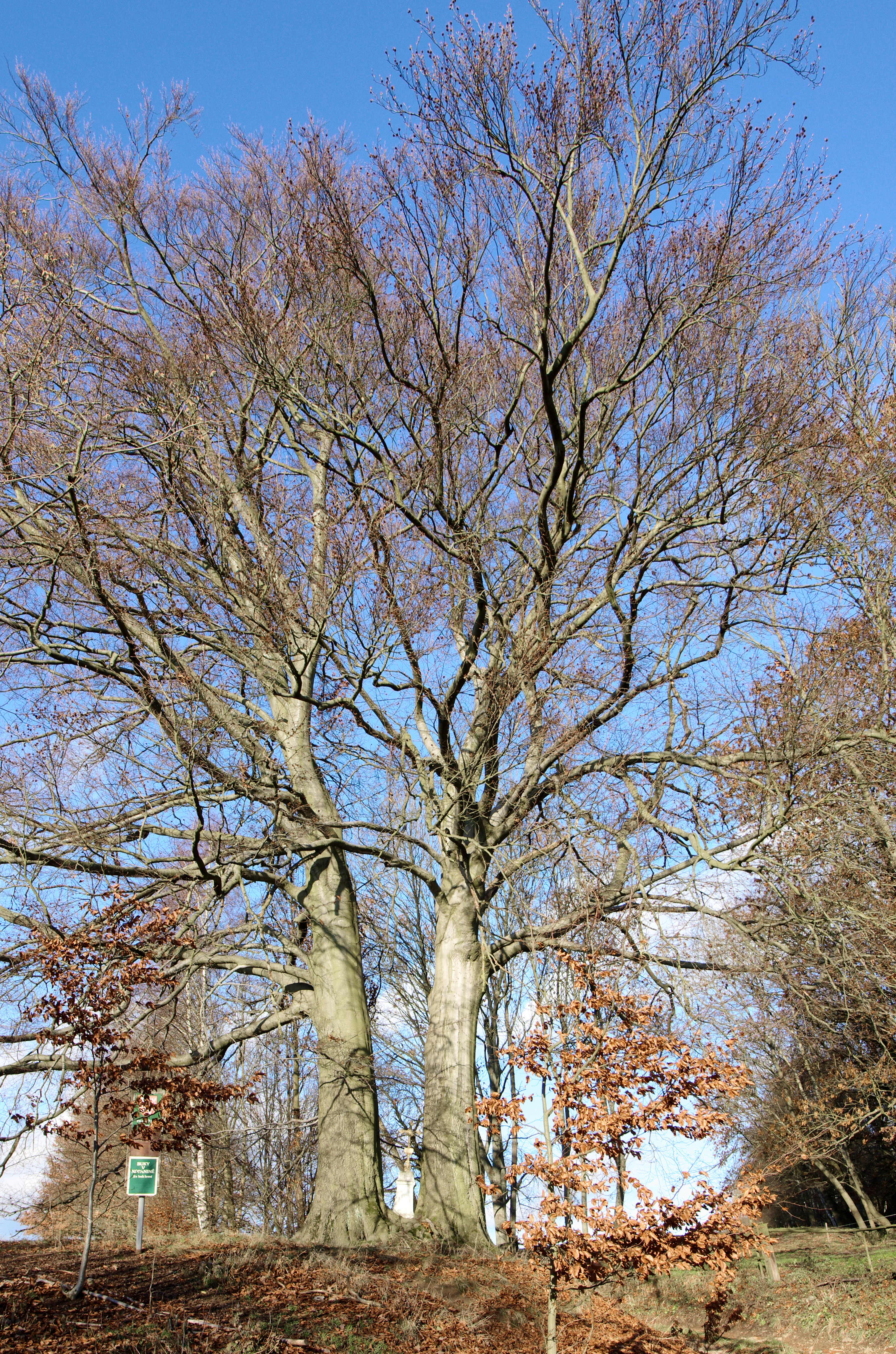 Památné stromy Buky v Kopanině (dvojice buků), Kopanina, okres Cheb